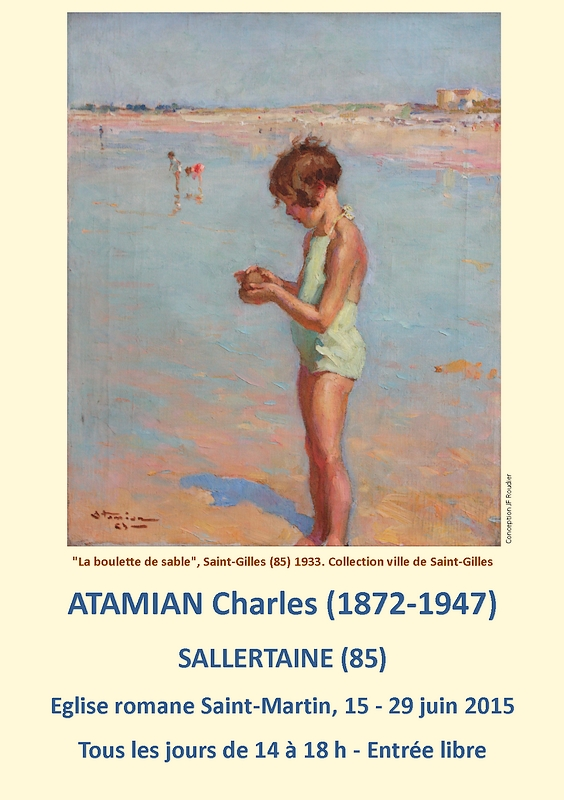 Cette affiche représente une toile de Charles, réalisée en 1932 à St Gilles, 46 x 38 cm. Donation à la ville de St Gilles.